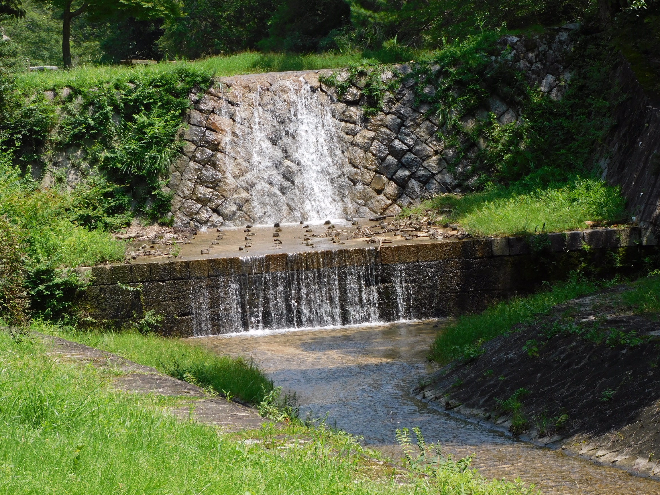 京都府木津川市山城町の砂防歴史公園にある堰堤